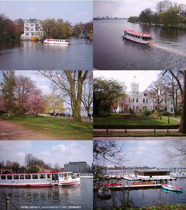 Verschiedene Ansichten der Außen- und der Binnenalster in Hamburg